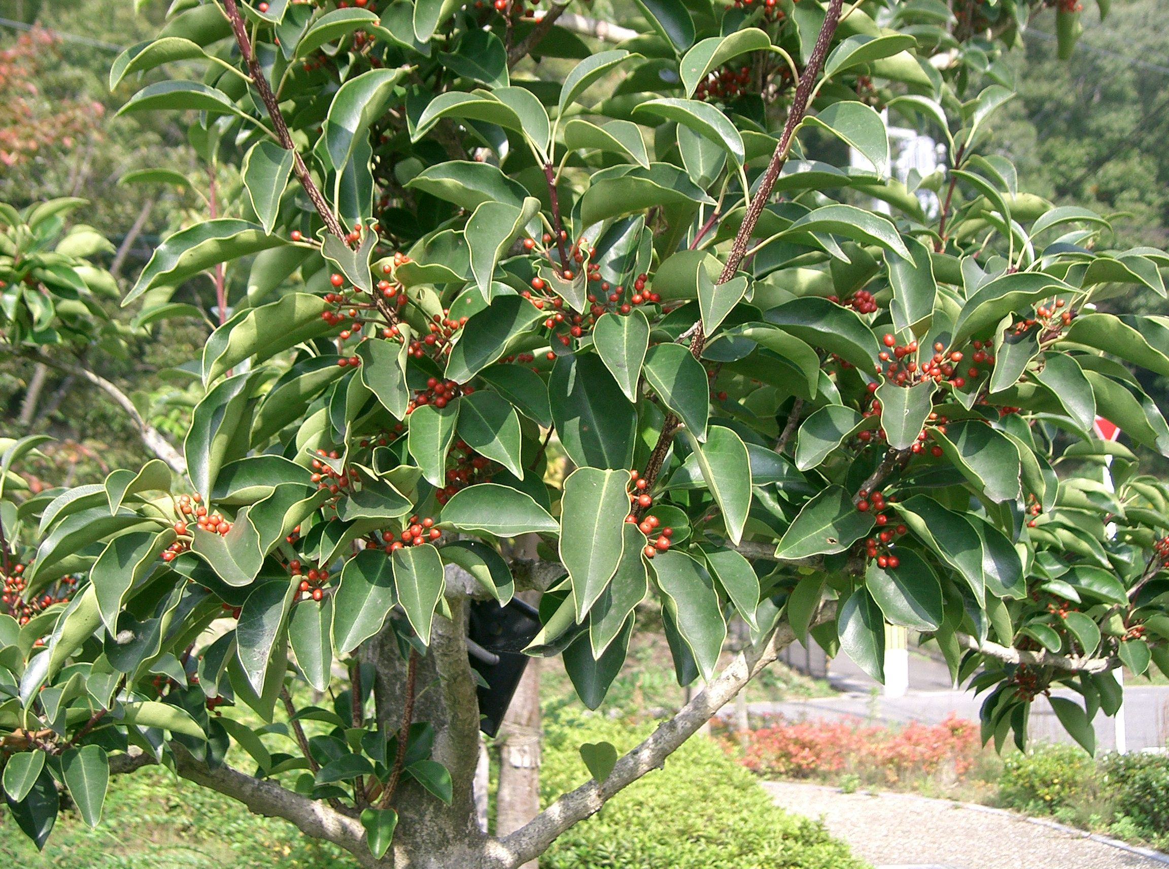 Ilex rotunda